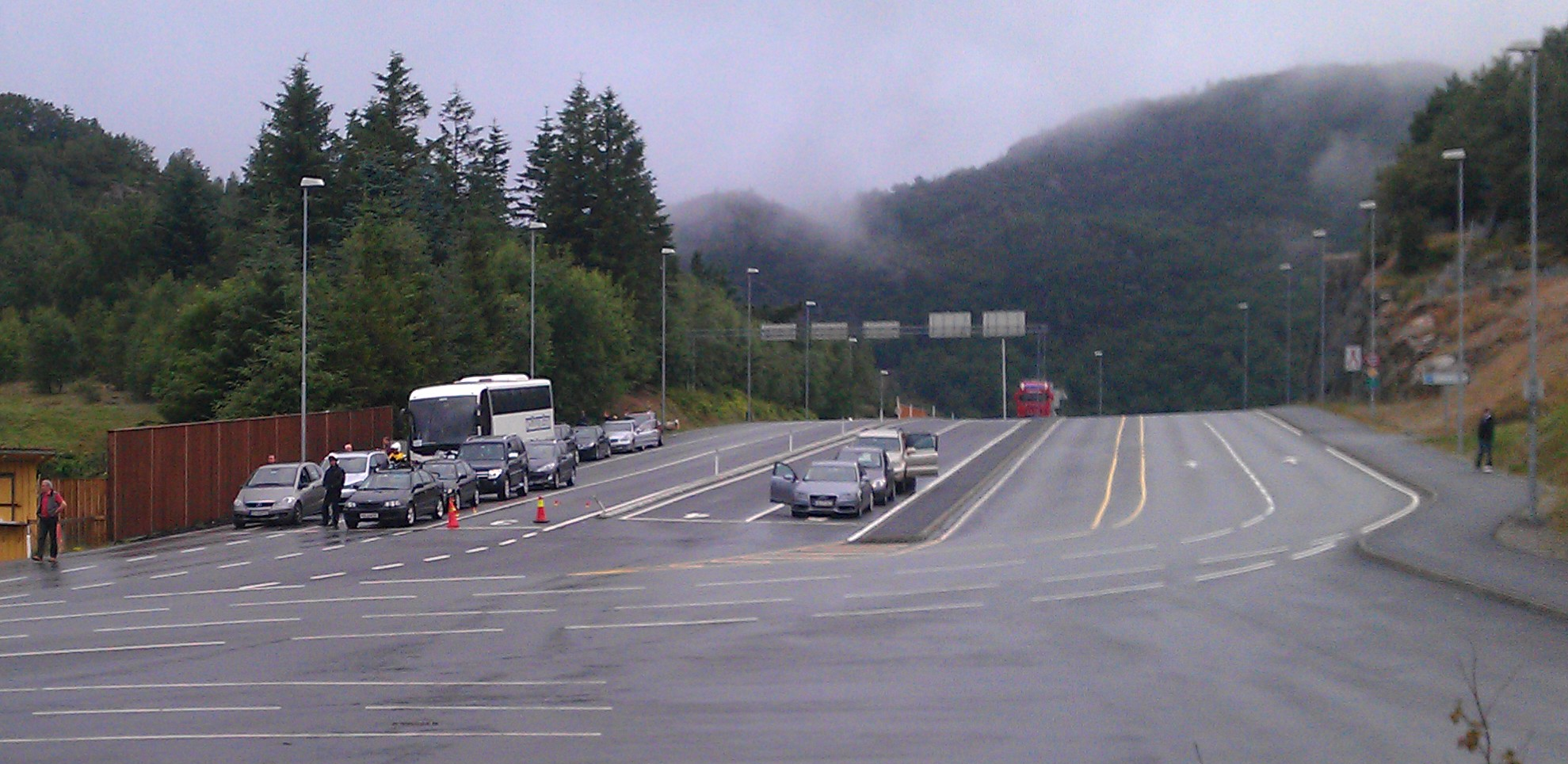 Lauvvik ferjekai 2012-07-24